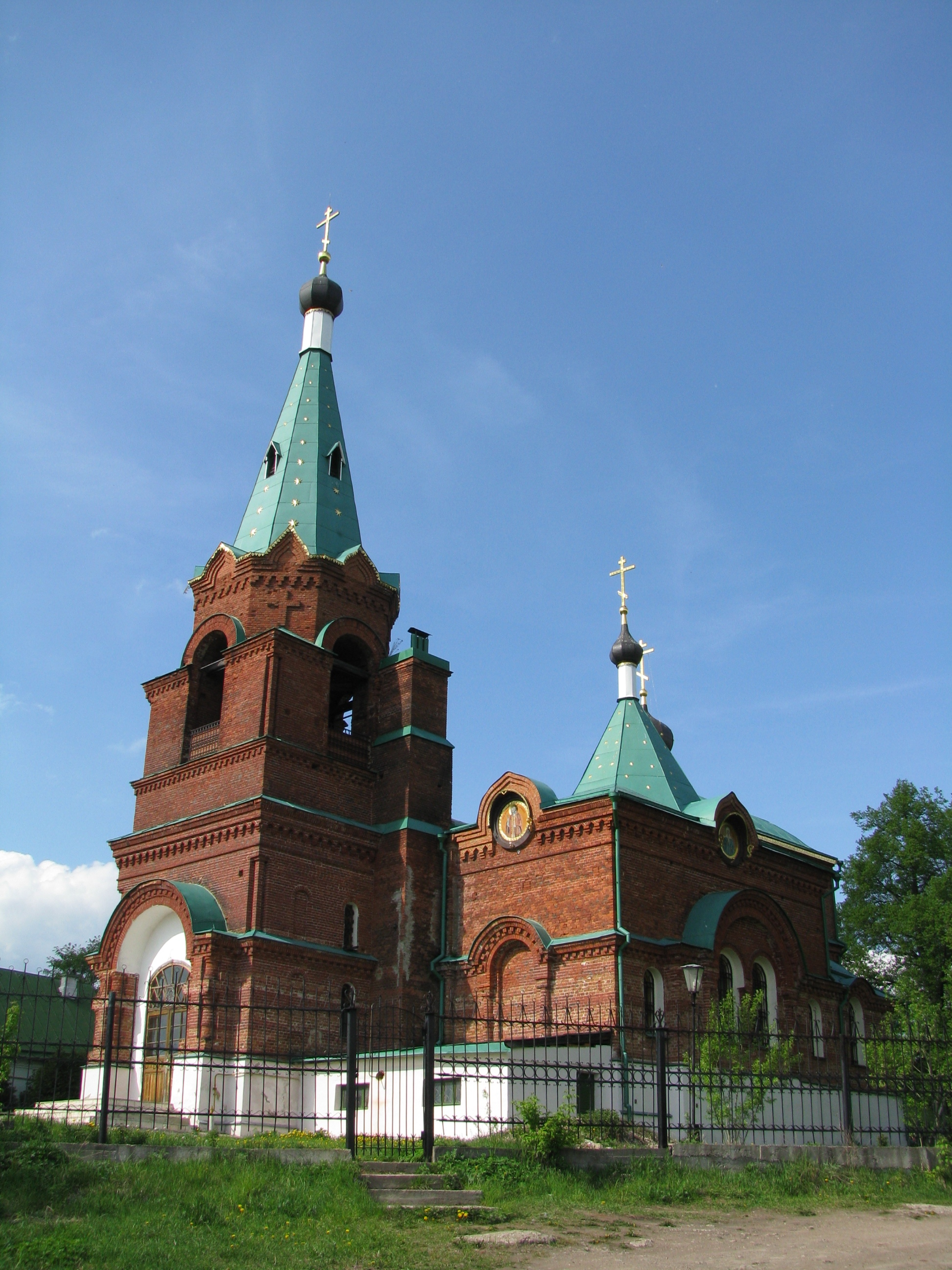 St. Nicolas Church in Buturlino village (Serpukhov District, Moscow Region)/ Церковь Николая Чудотворца в деревне Бутурлино (Серпуховский район Московской области)